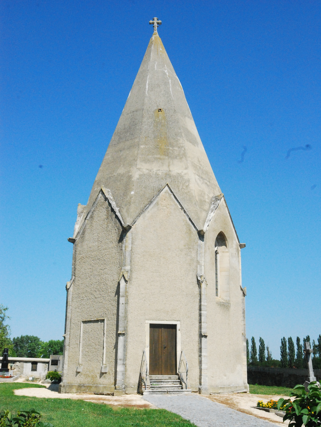 Der Karner von Zellerndorf in Niederösterreich